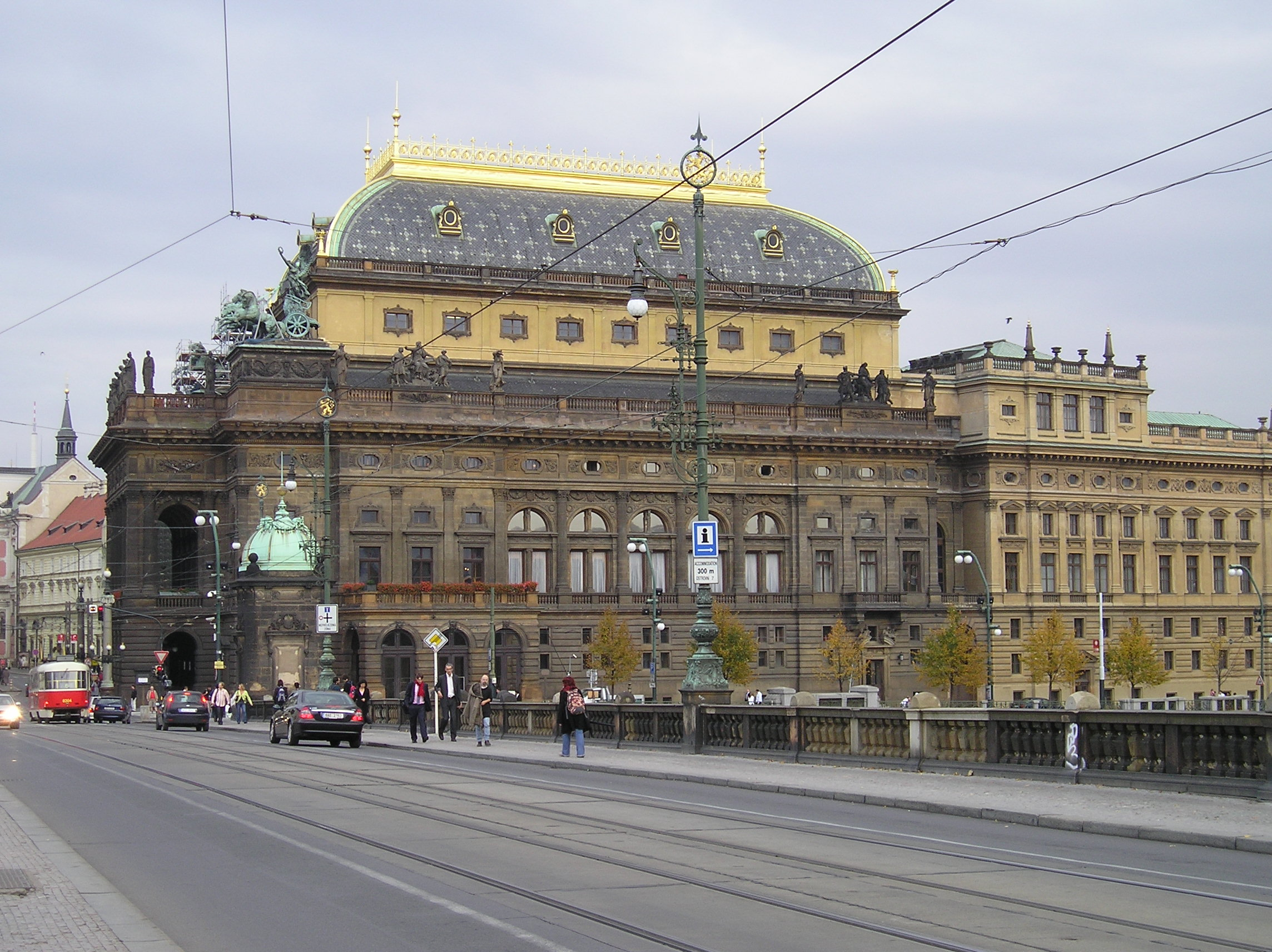 Praag - Národní divadlo